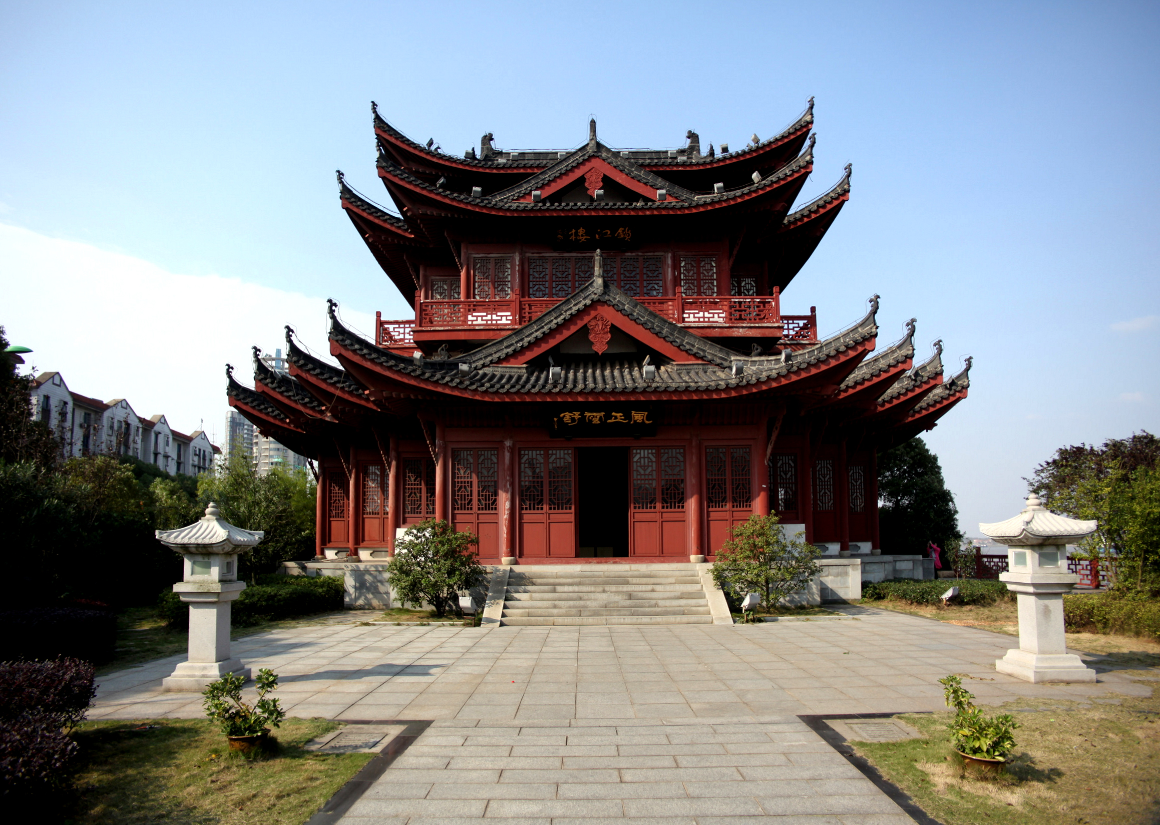 九江市锁江楼